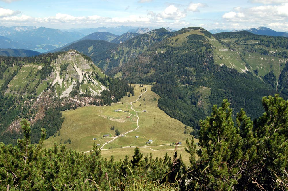 v.l.n.r.: Holzeck (1603 m) dahinter Wolfgangsee, Genneralm, Osterhorn (1746 m, im Hintergrund), Hoher Zinken (1764 m, breit, rechts der Mitte) und Großes Radl (1742 m), Blick vom Gennerhorn nach Osten.